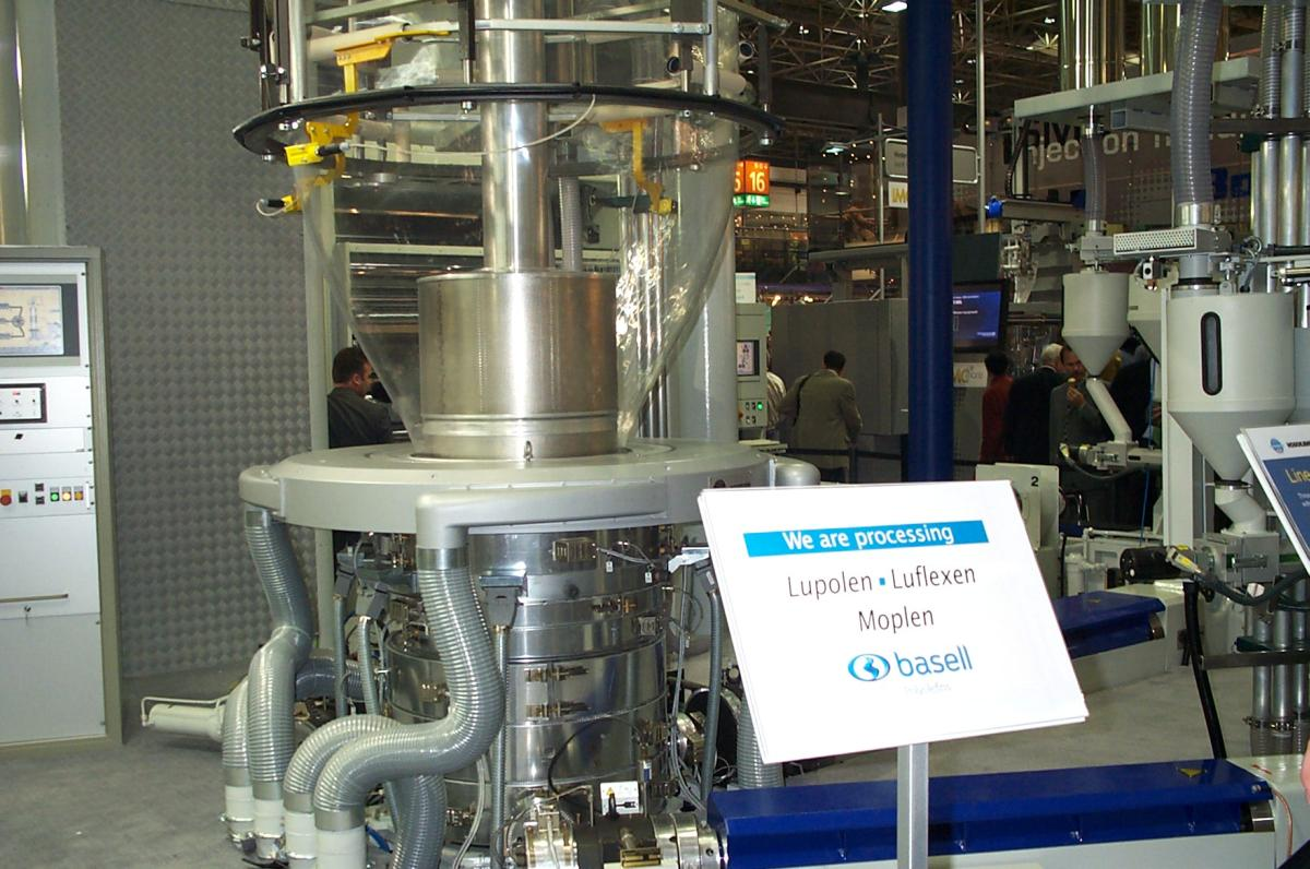 Alpine-Mehrschicht-Schlauchfolienanlage auf der K'01 (Düsseldorfer Kunststoffmesse)